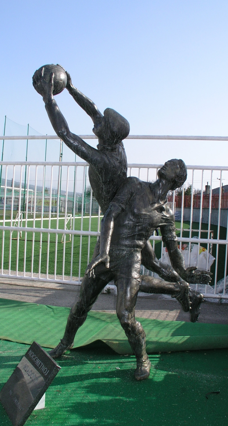 Spomenik nogometnoj mladosti na ulazu nogometnog igrališta NK Orijent u Rijeci, Hrvatska